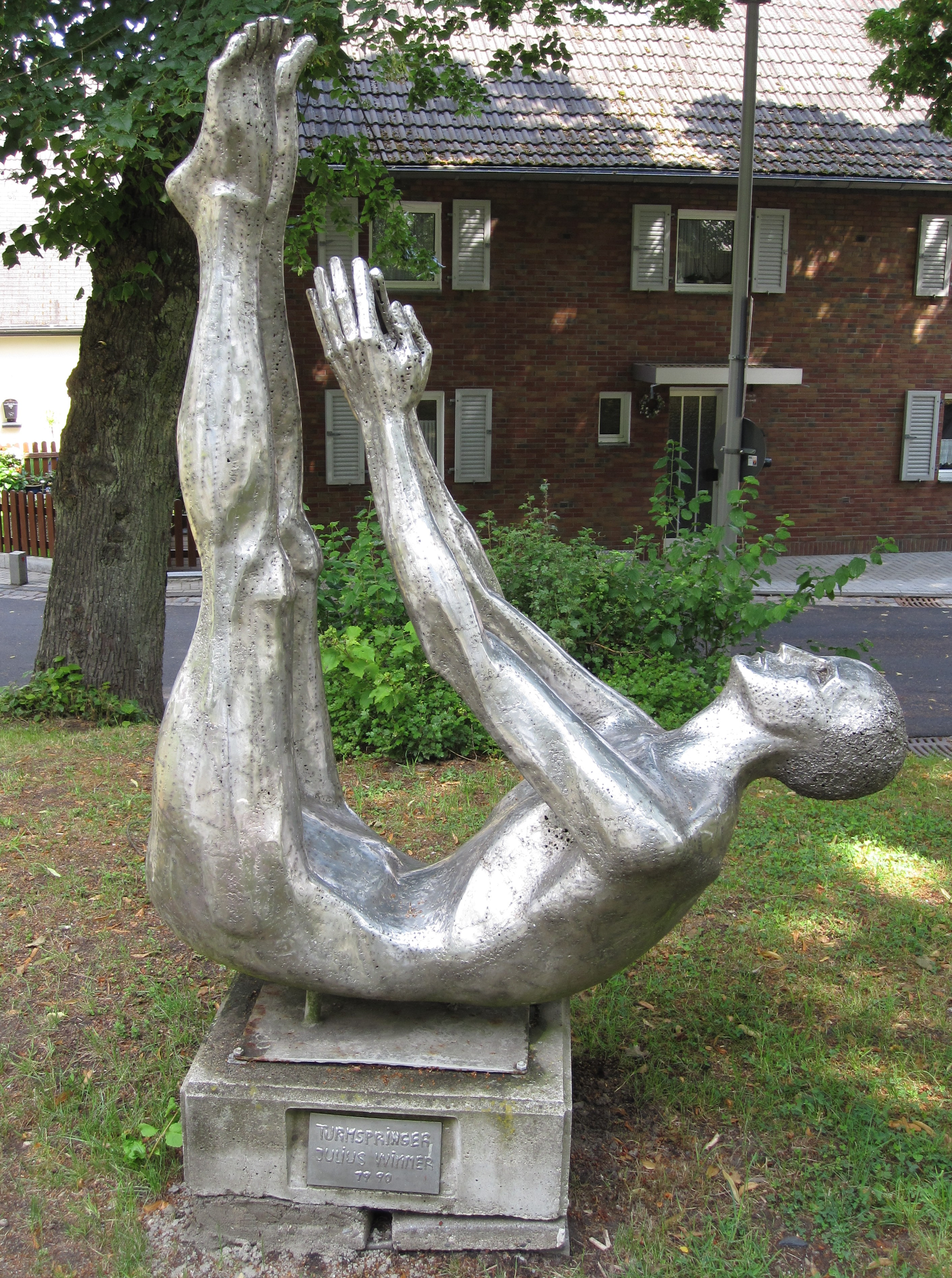 Plastik eines Turmspringers von Julius Wimmer, 1990